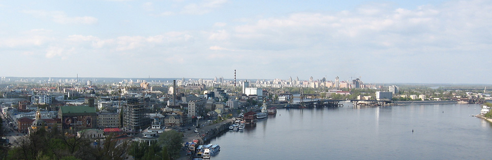 Правобережный Киев и Днепр